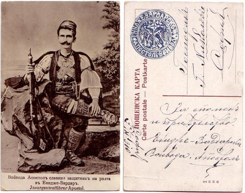 Bulgarian postcard signed and stamped from Petkov and send to his fellow Tane Nicolov.